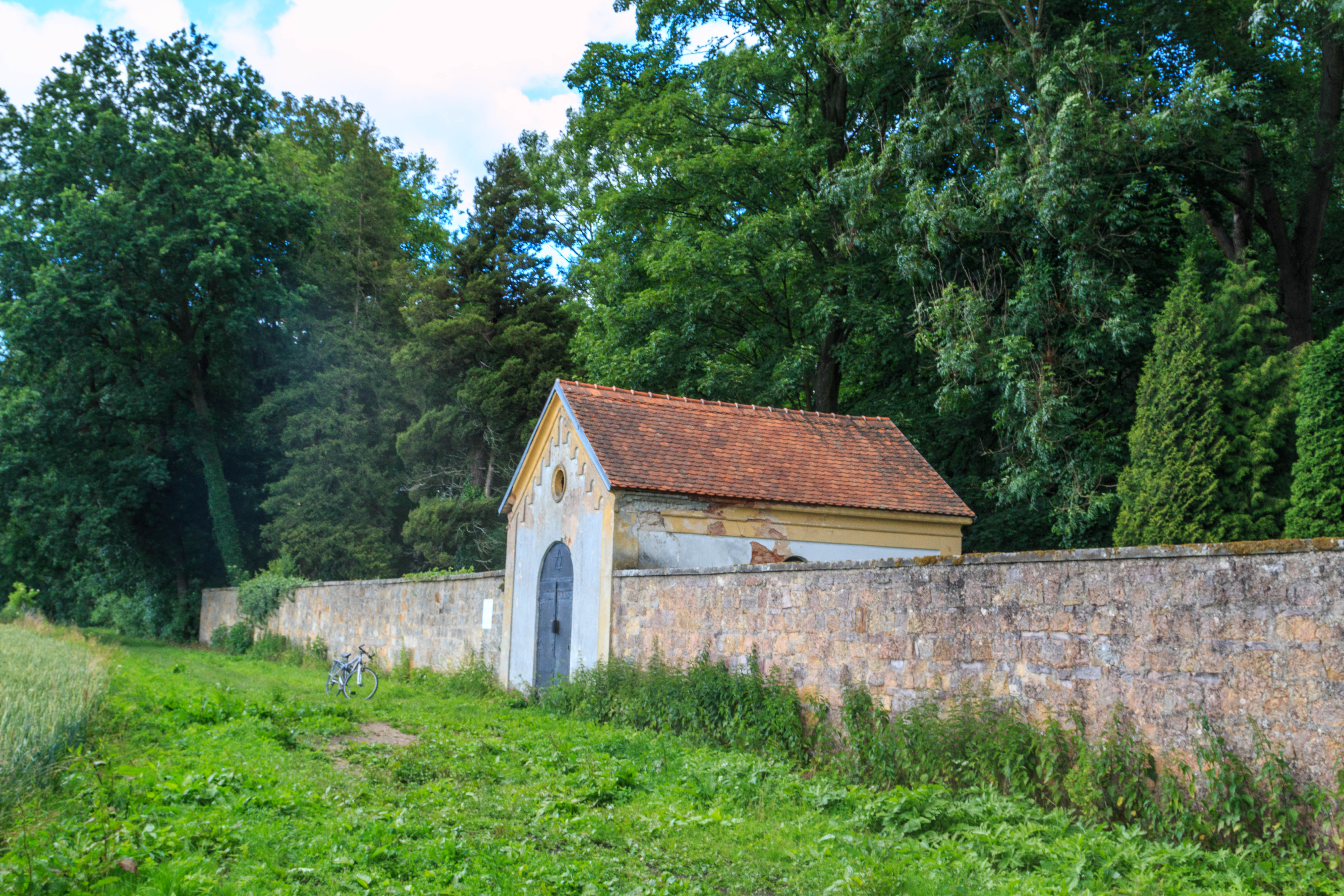 Jewish cemetery in Jičín